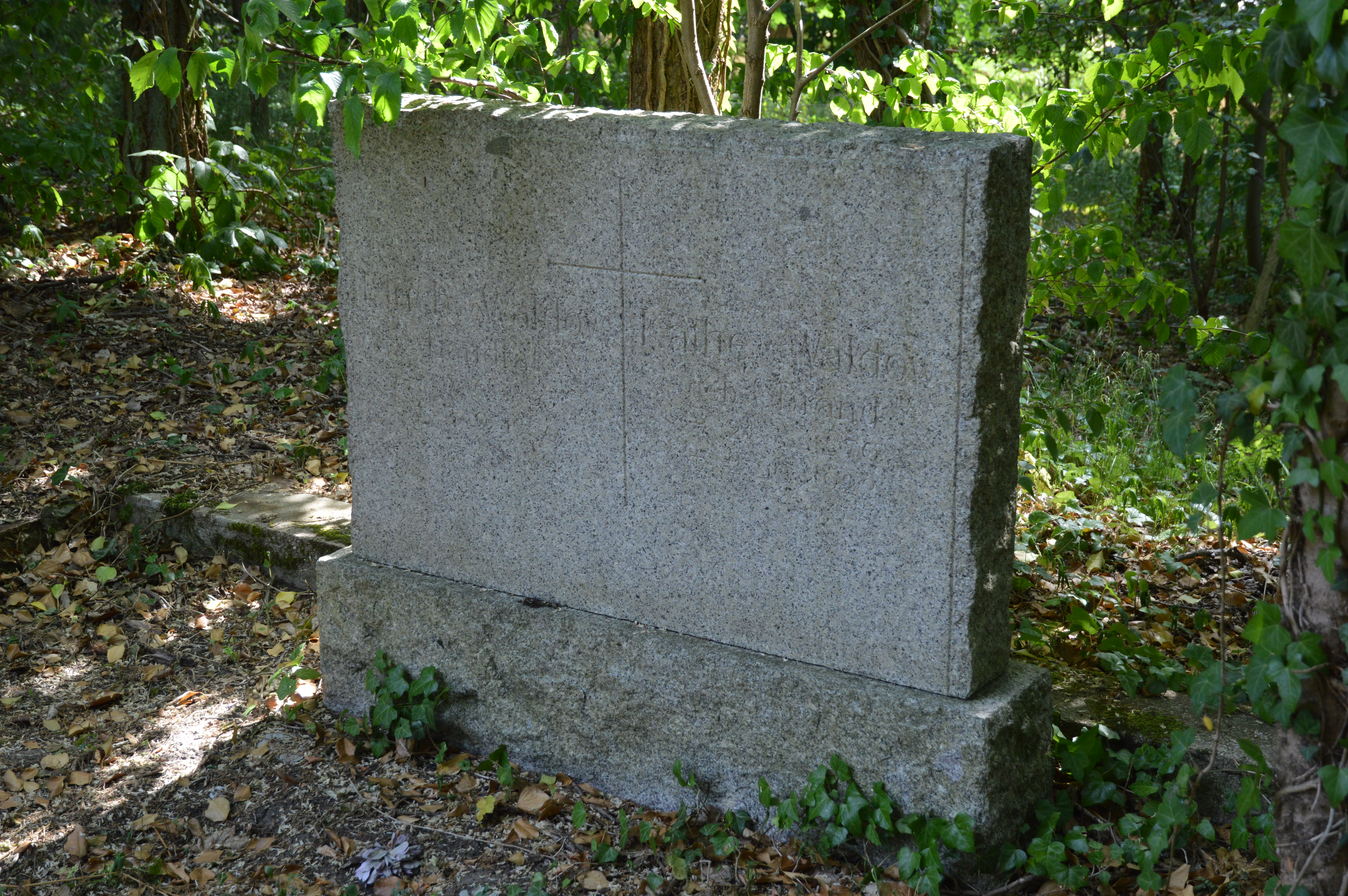 Grób: Ulrich von Waldow (1863-1936) i jego żona Kathy z domu von Brandt (1870-1922)